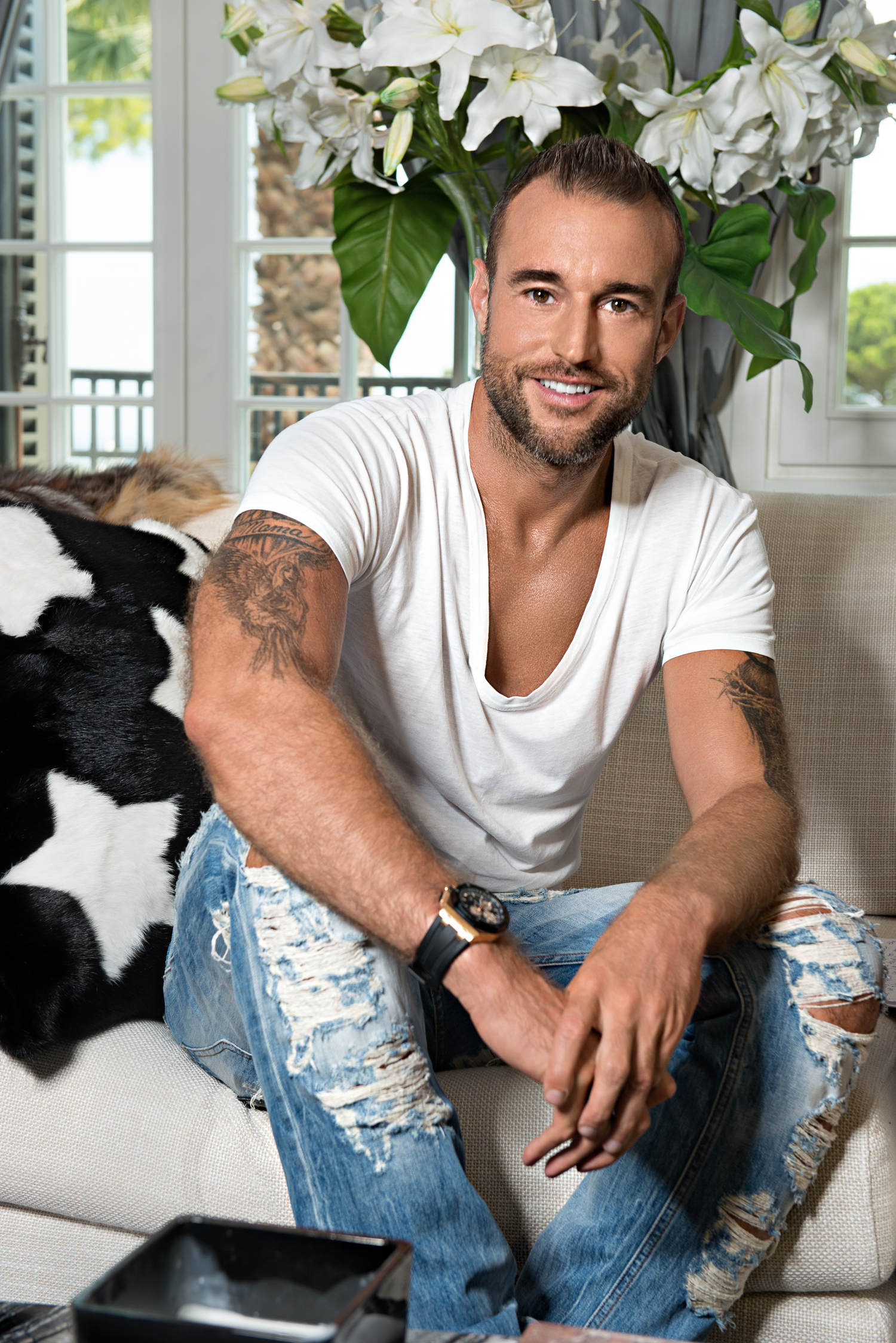 Philipp Plein dans son salon photographié par Gil Zetbase